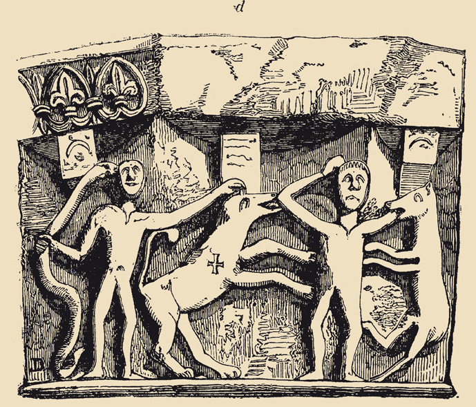 Saint Martin de Sescas Chapiteau arc triomphal sud